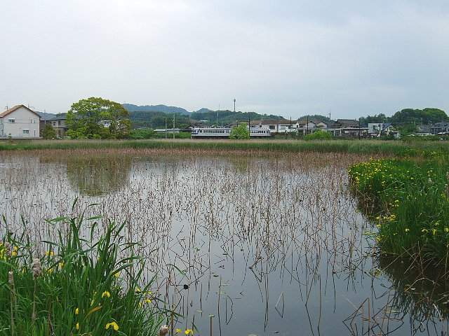 甘露寺前駅（右手奥）を出て貴志駅（左手）へ向かう和歌山電鐵の電車